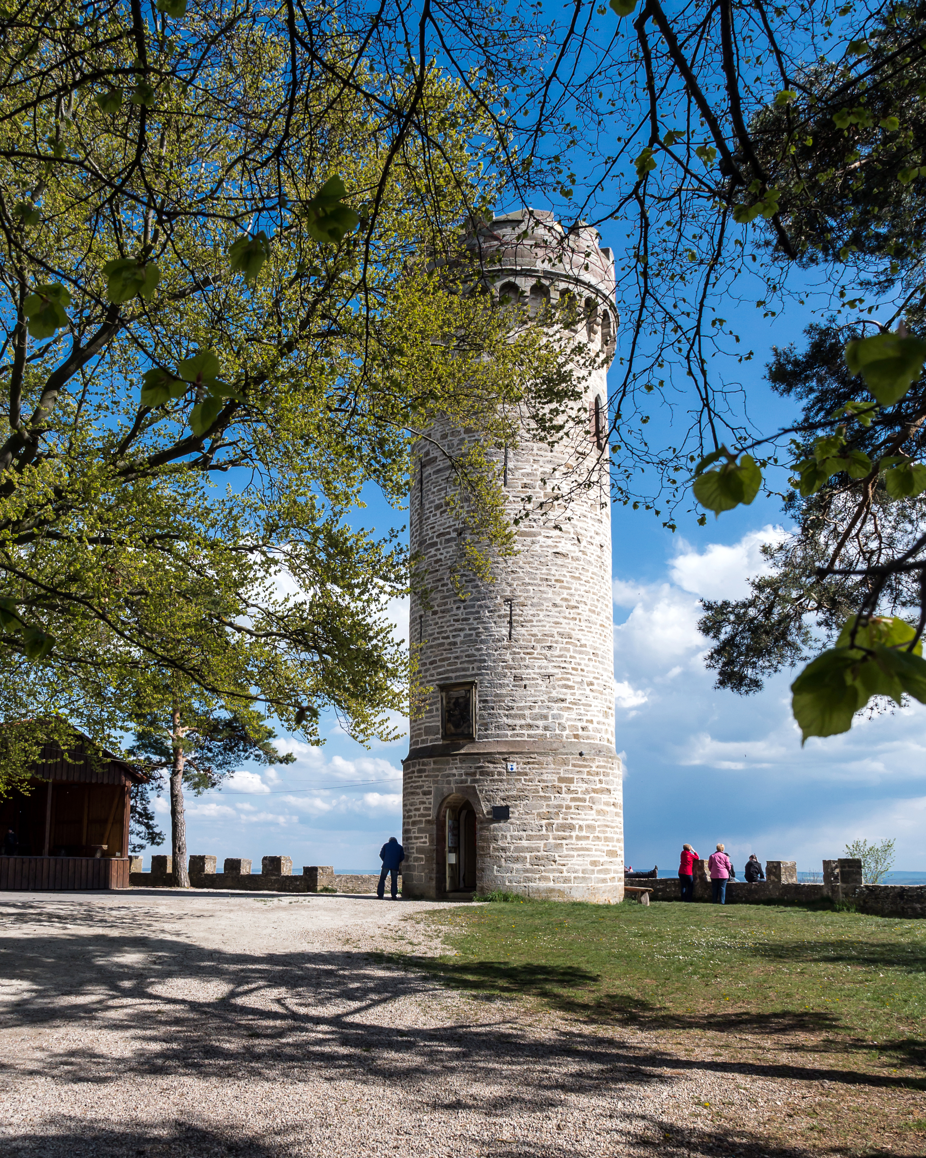 Denkmalgeschützter Aussichtsturm oberhalb von Kleinkochberg, Ortsteil von Uhlstädt-Kirchhasel